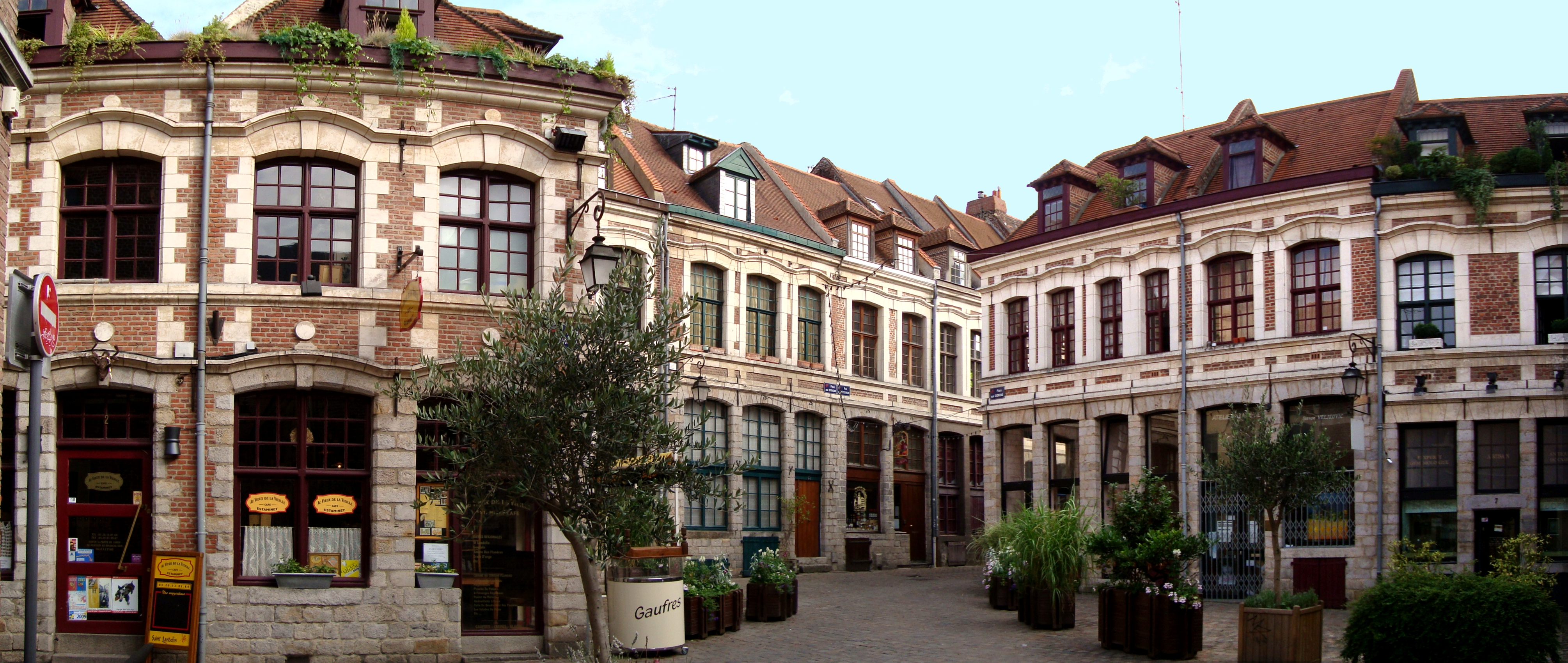 La place aux oignons à Lille (Nord).